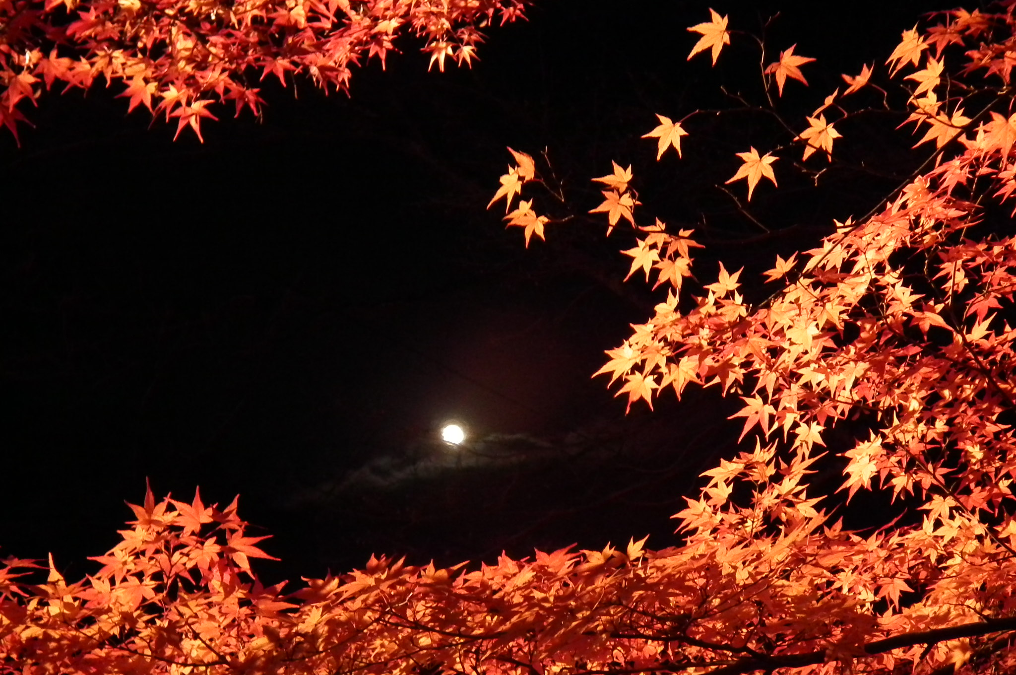 Arashiyama Hanatōro, Nison-in 嵐山花灯路・二尊院 紅葉と月